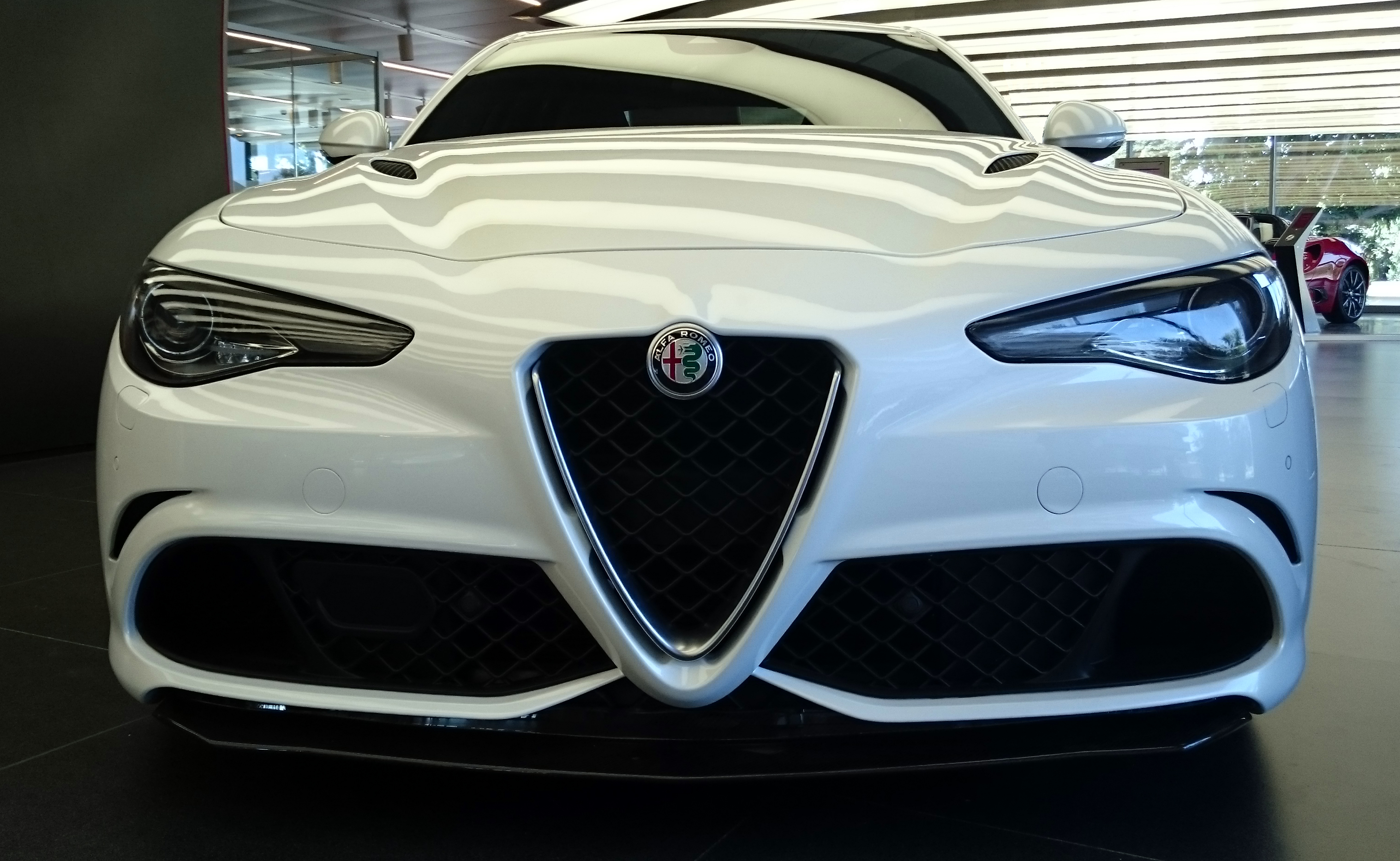 Un modello pre-serie (fatto a mano) della Alfa Romeo Giulia 2015 esposto in anteprima mondiale al rinnovato Museo Alfa Romeo di Arese in occasione dei 105 anni del marchio